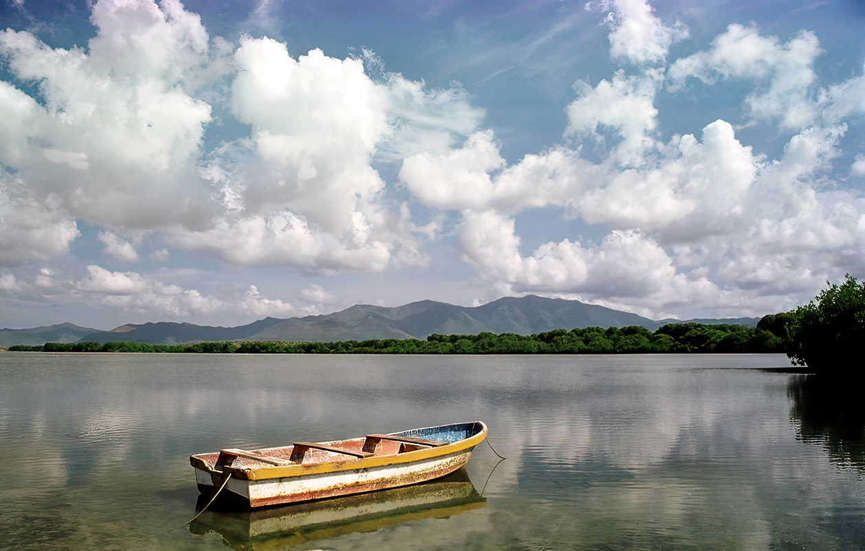 Laguna de las Marites, Margarita, Nueva Esparta, Venezuela